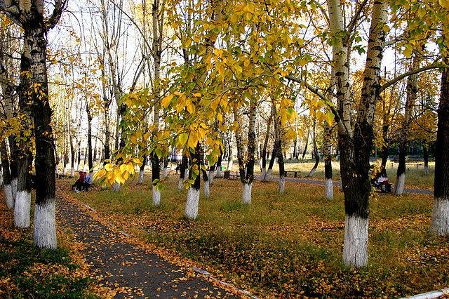 Парк Магдагачи осенью